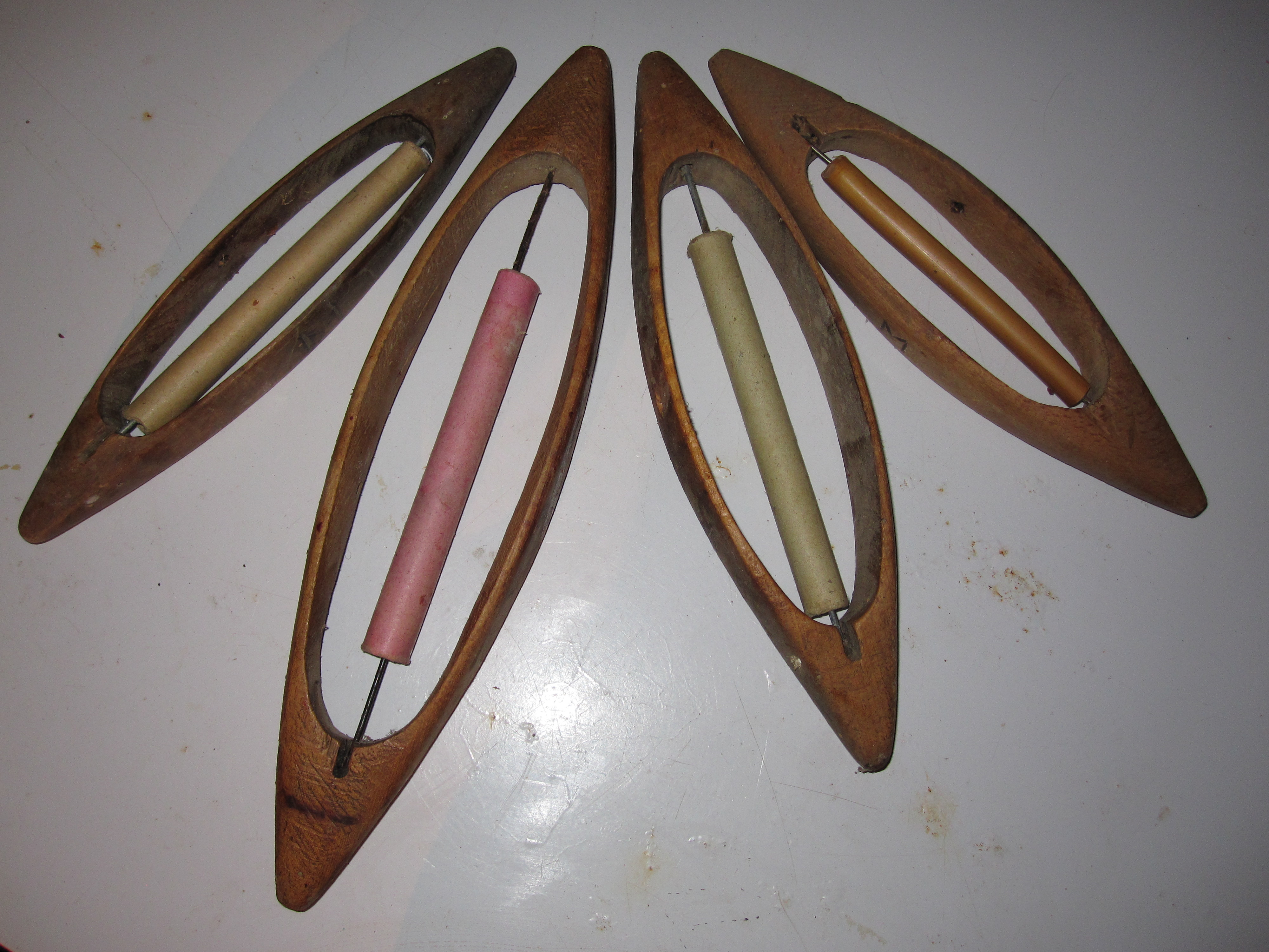 Солки се помошни алатки при ткаење.